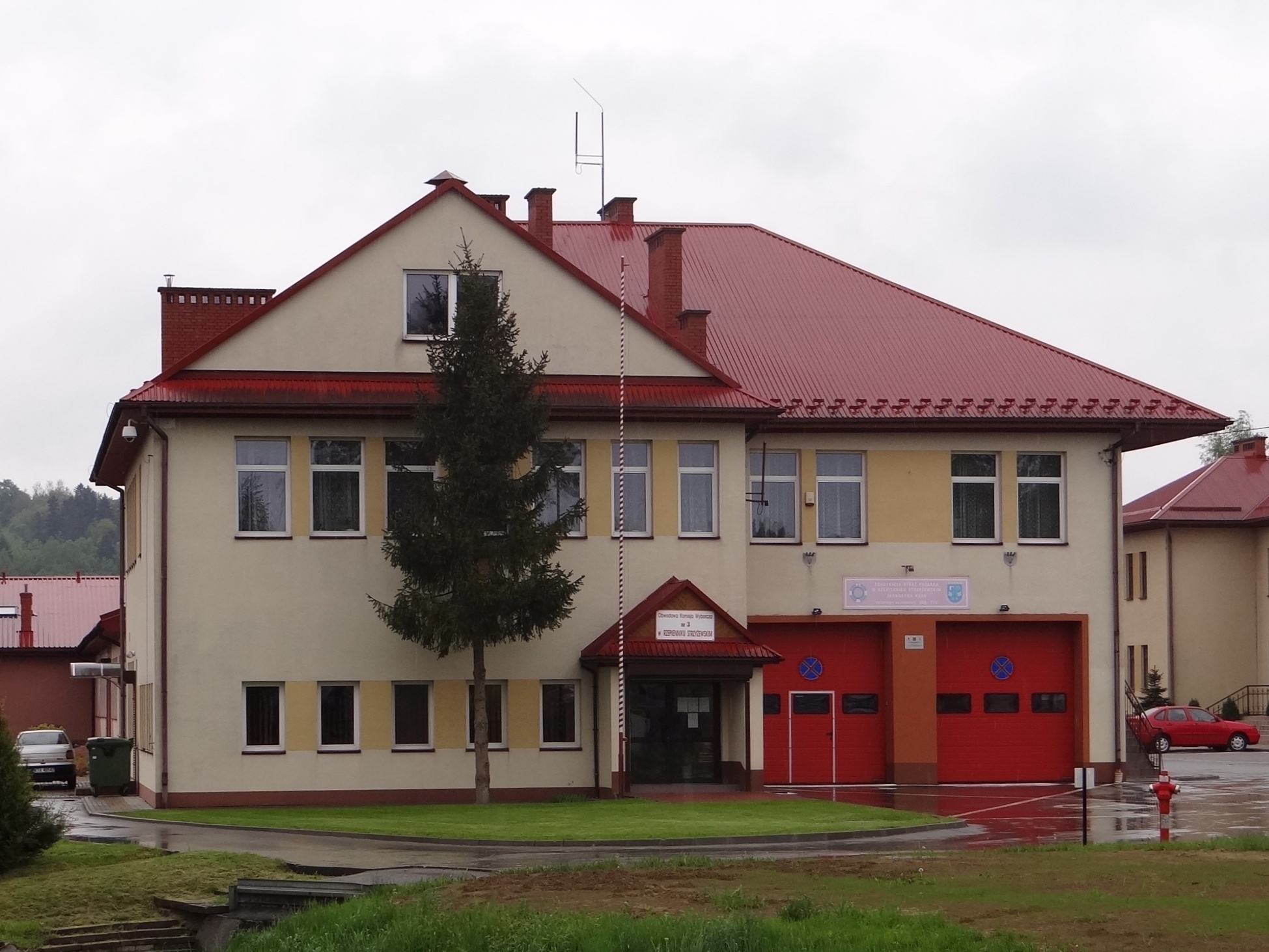 Remiza OSP w Rzepienniku Strzyżewskim